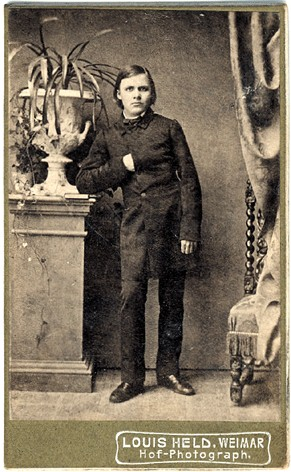 Portrait of Friedrich Nietzsche (1844-1900)